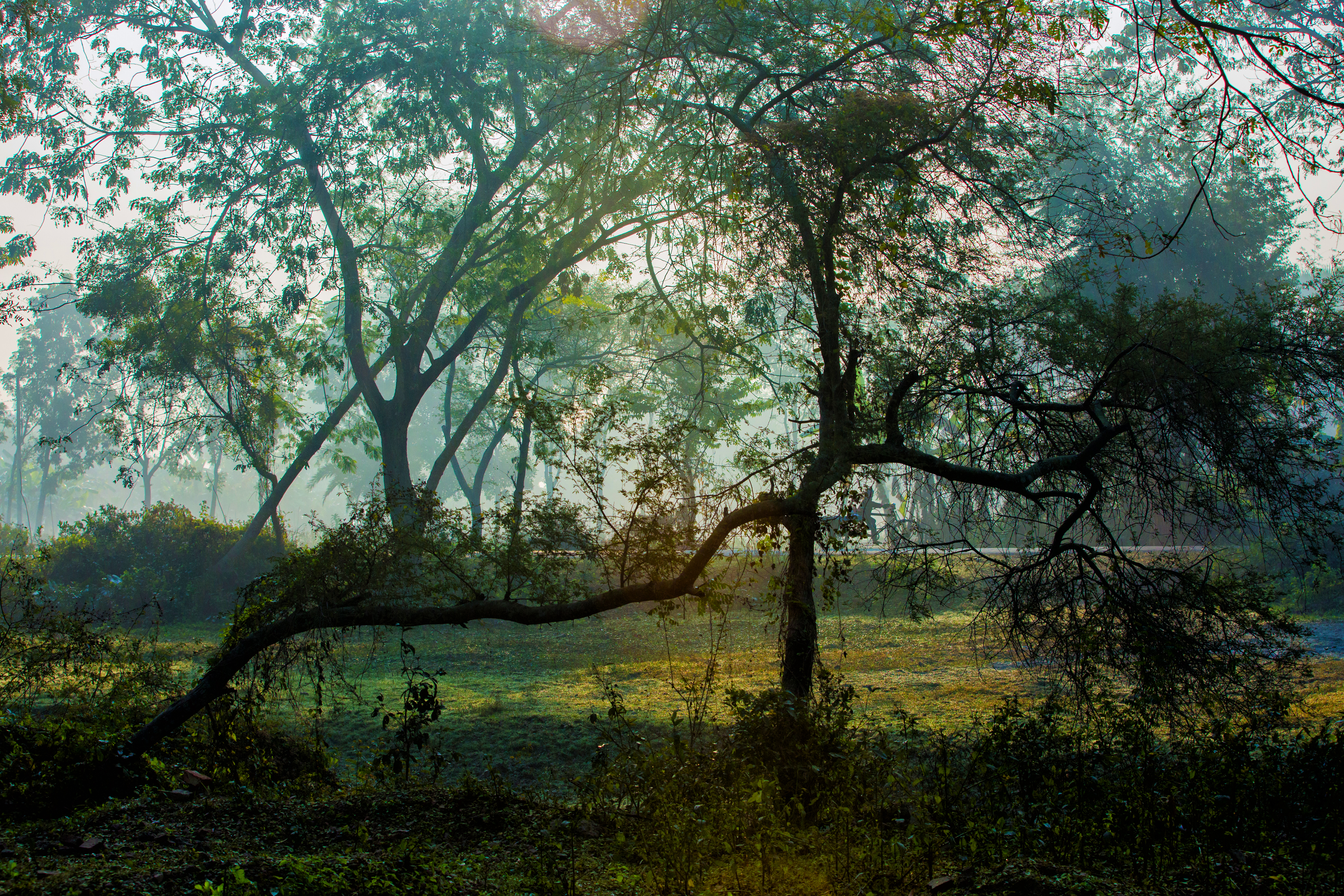 অরুনিমা ইকোপার্ক